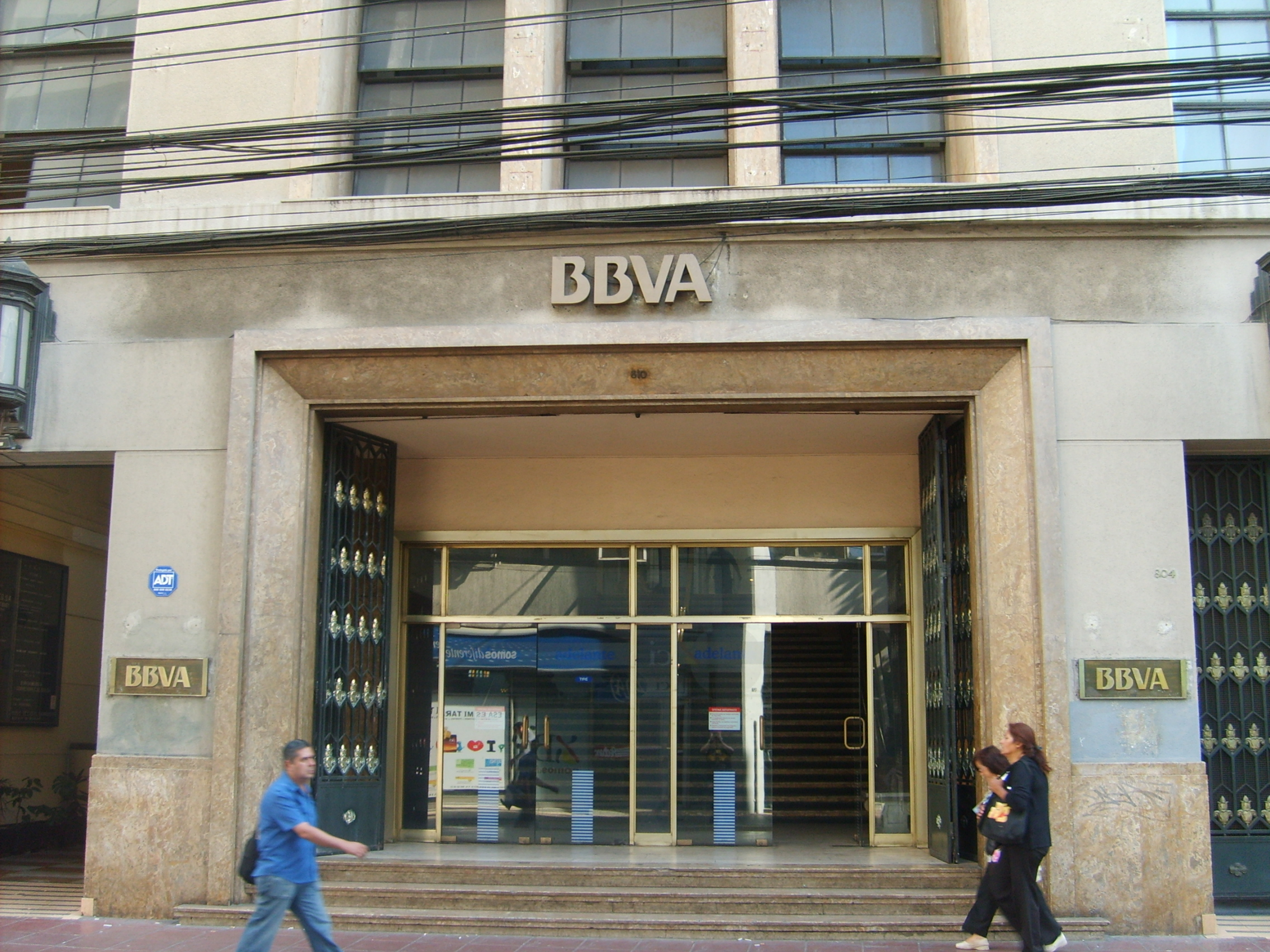 Sucursal del Banco BBVA en la ciudad de Valparaiso ,CHile